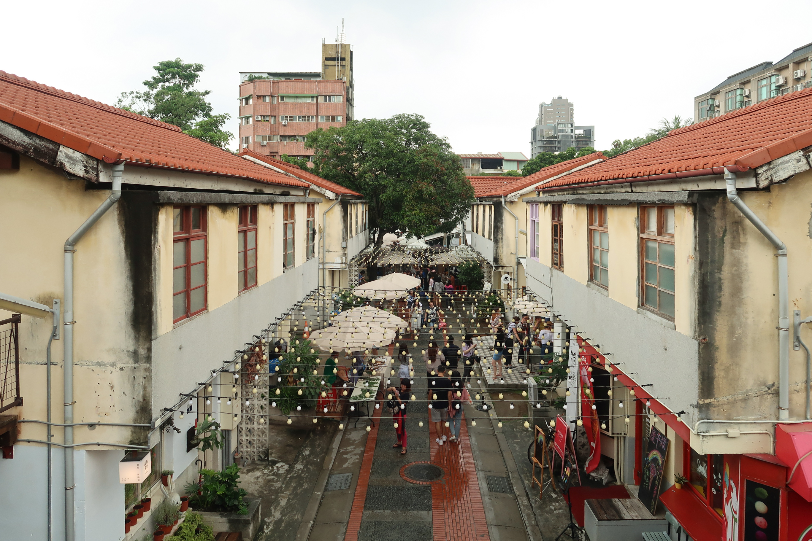 Shenji New Village